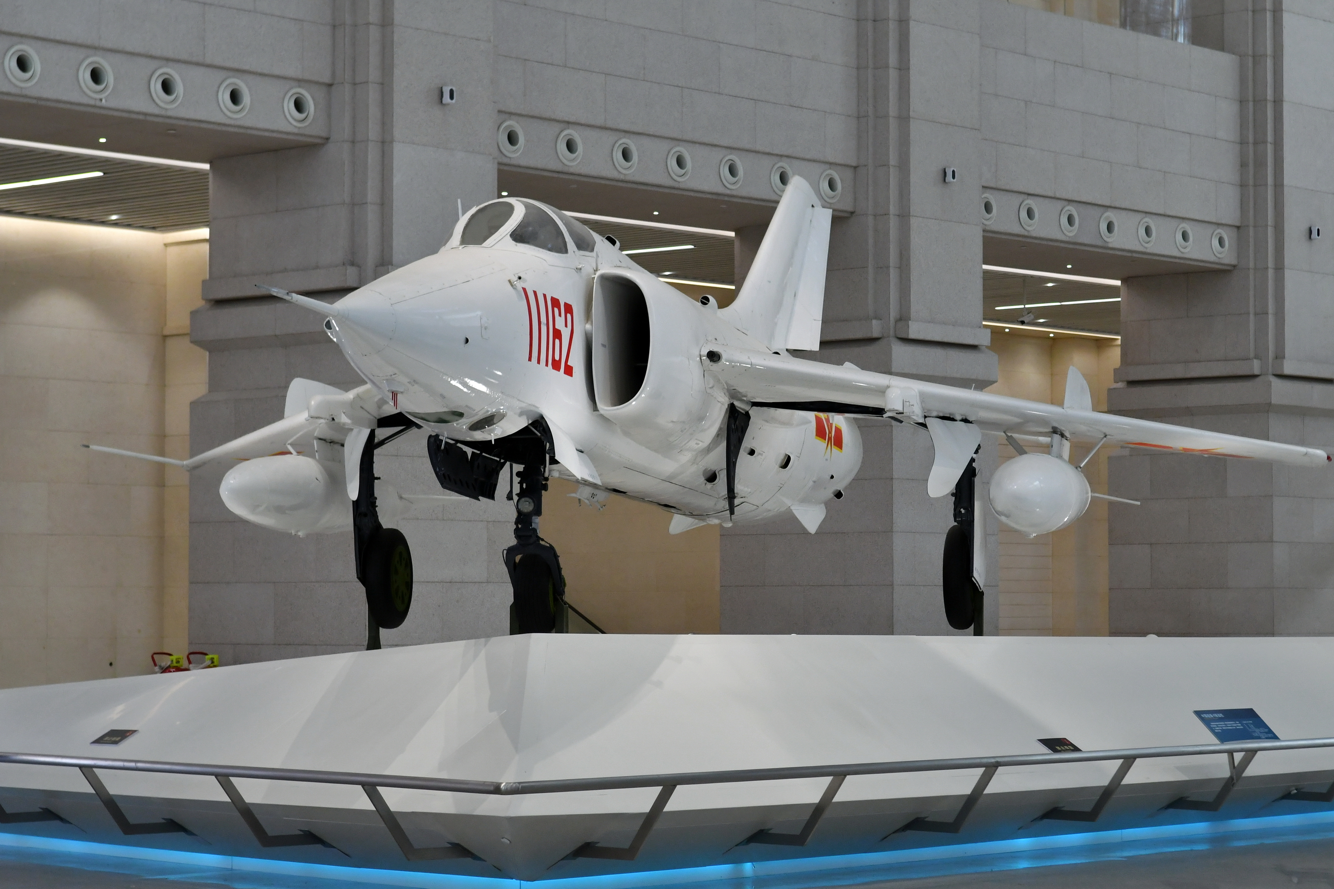 中国人民革命军事博物馆展出的强-5强击机。